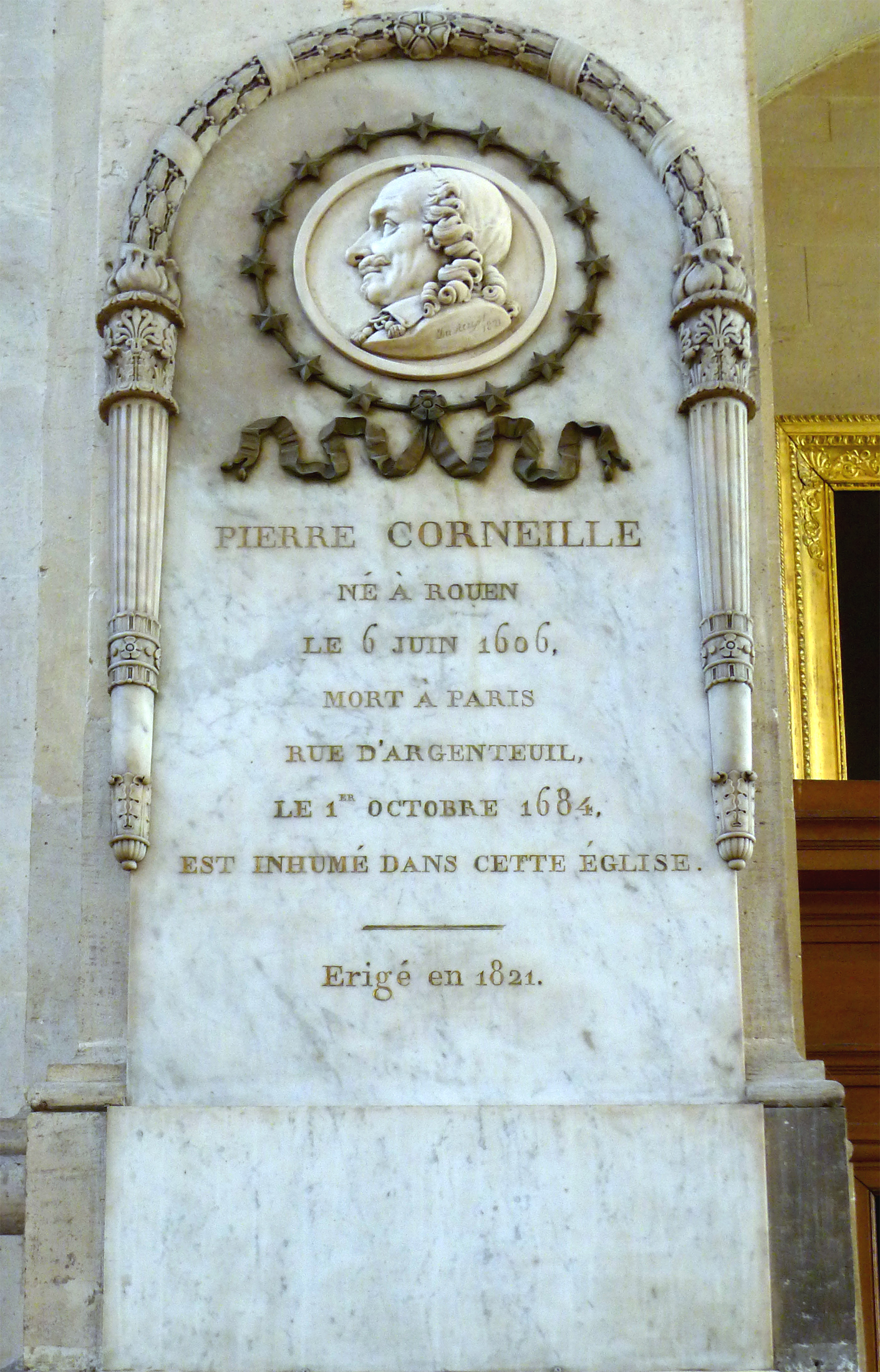 Église Saint-Roch (plaque commémorative Pierre Corneille) - Paris Ier